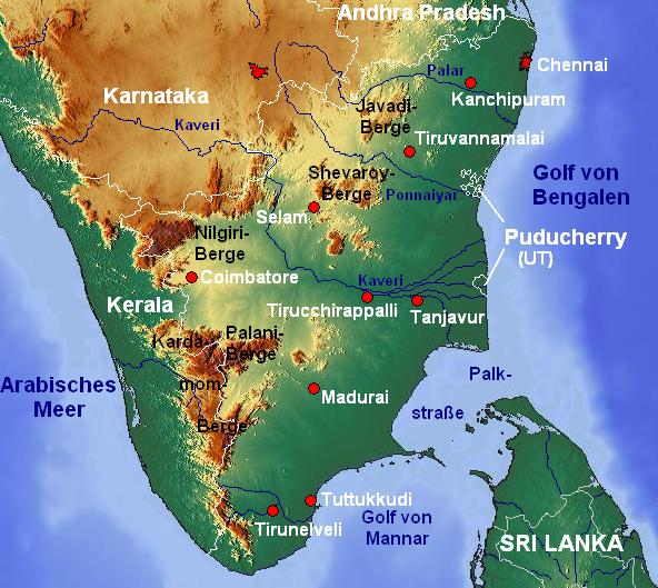 Topografische Karte von Tamil Nadu (Indien) mit Städten, Flüssen und Gebirgszügen